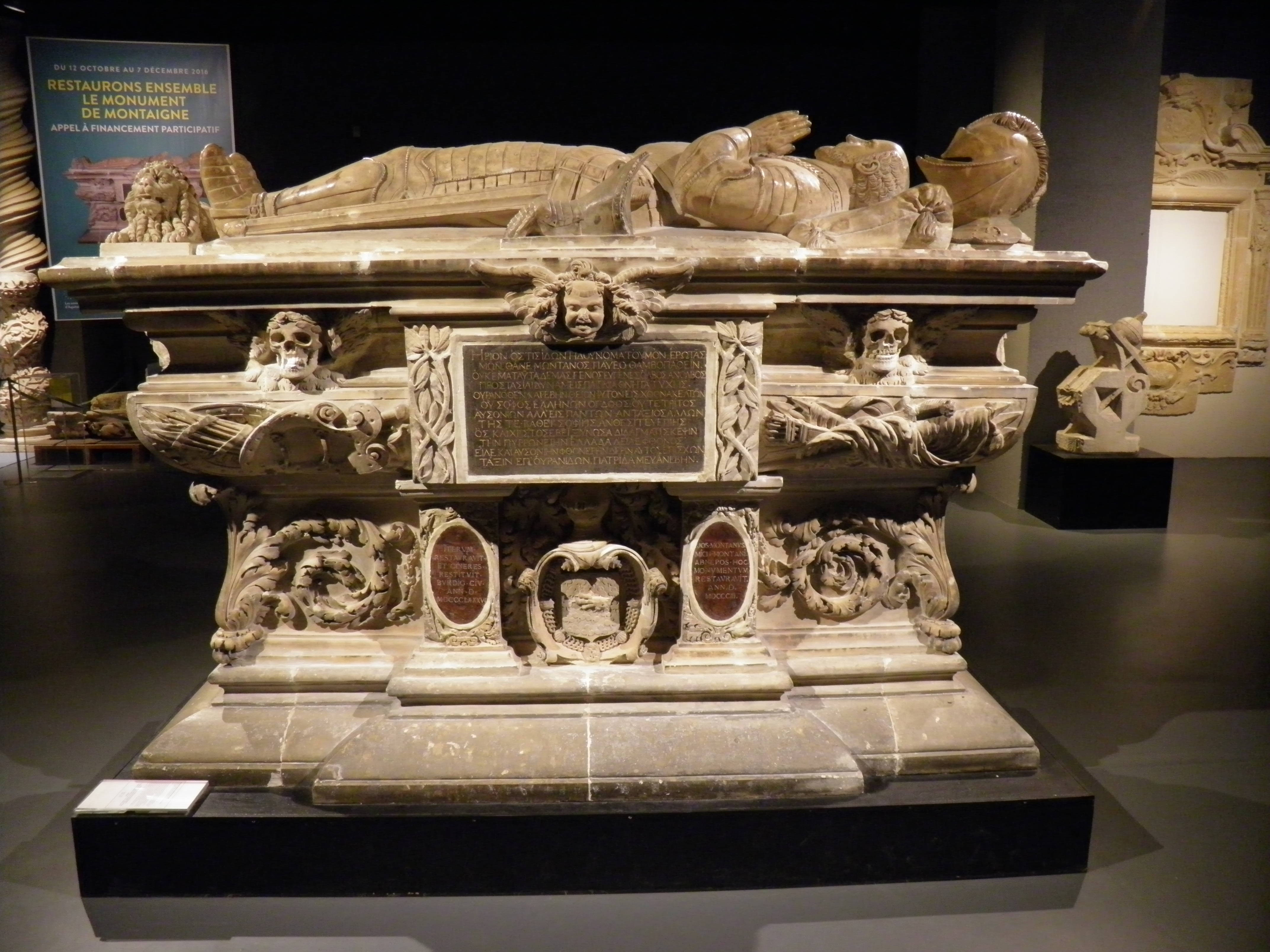 Monument funéraire de Michel de Montaigne au musée d'Aquitaine à Bordeaux (Gironde, France).